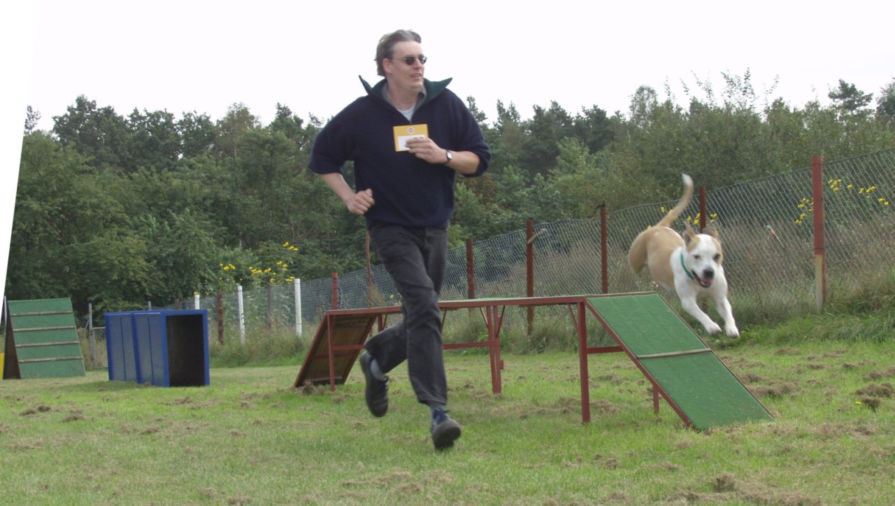 Sheila (mit Halter) läuft den Hindernislauf. – Von links nach rechts: A-Wand, Tunnel, Laufdiel (Laufsteg)